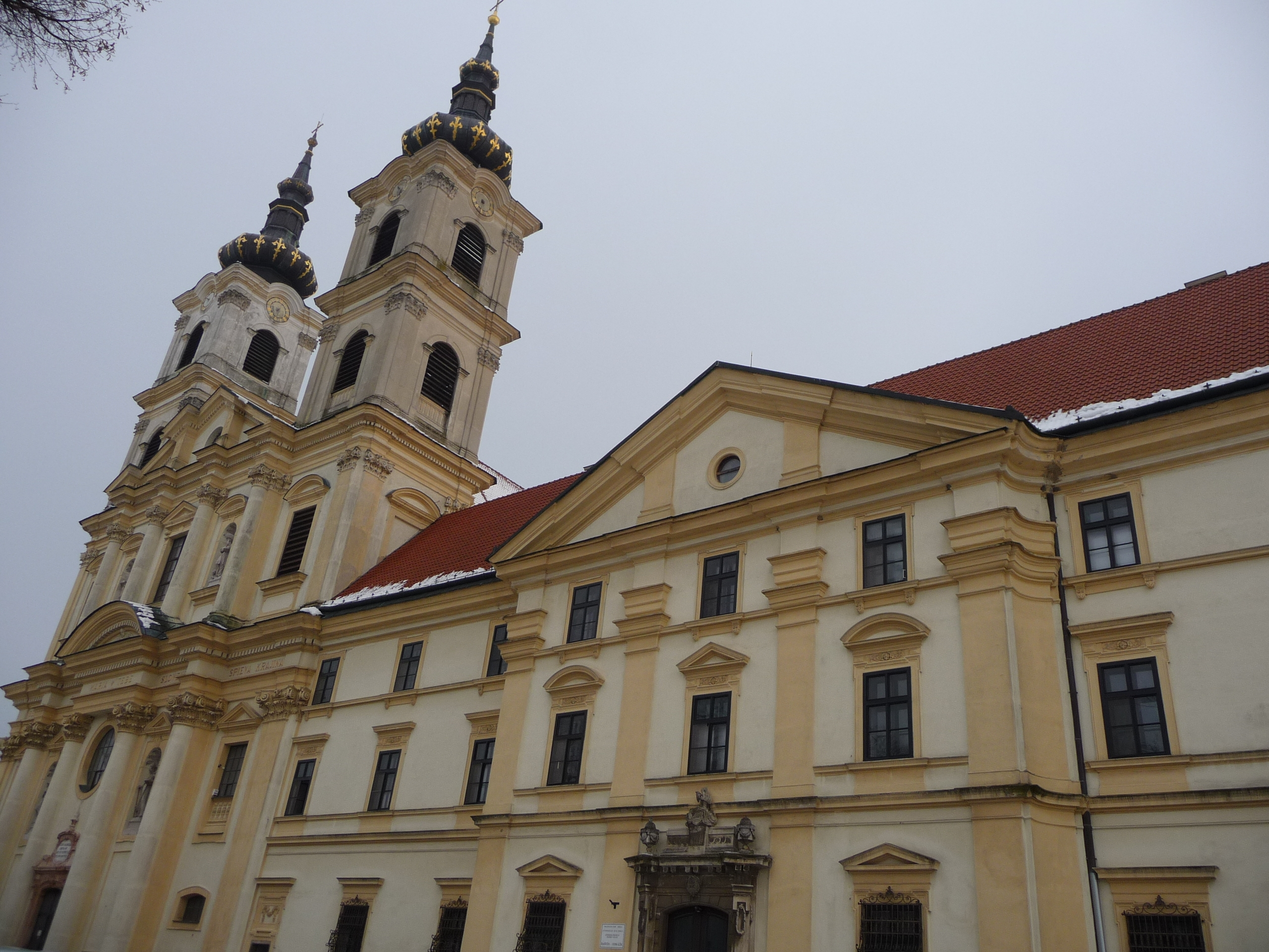 Bazilika Panny Marie sedmibolestné v Šaštíne-Strážích na Slovensku